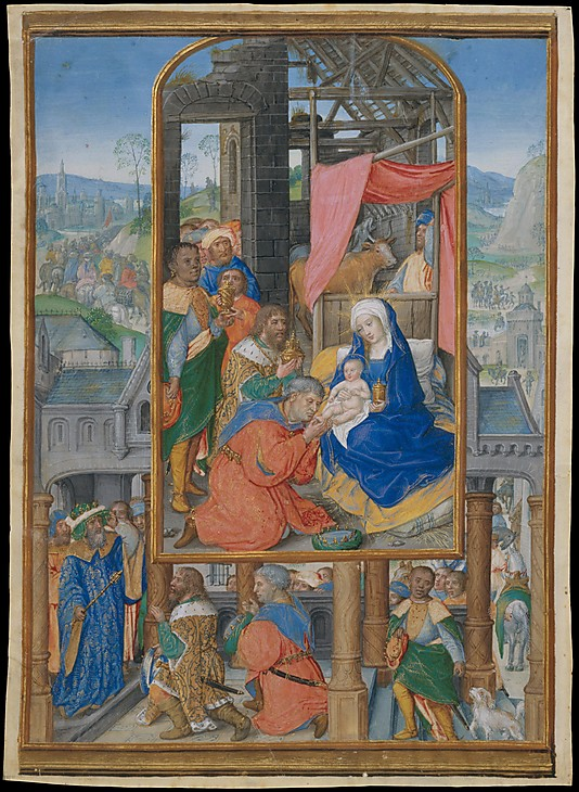 Manuscript Illumination with Adoration of the Magi Master of James IV of Scotland (Gerard Horenbout ?)